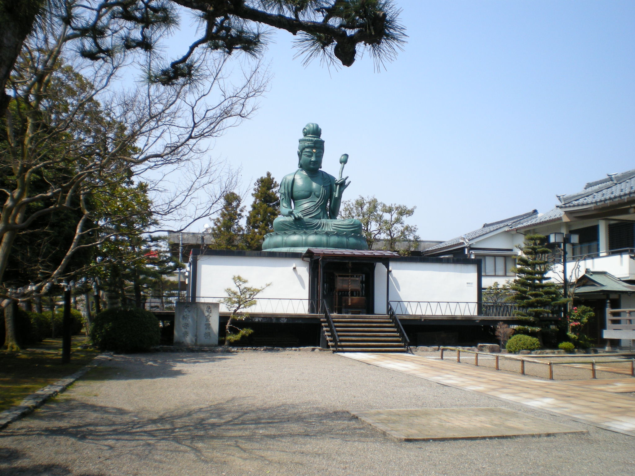 福井大仏観音